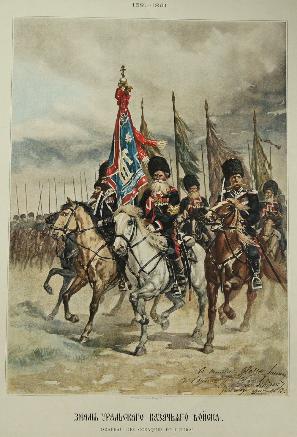 Репродукция рисунка "Знамя Уральского Казачьего войска".Работа написана в 1891 г. к 300-летию службы уральских казаков (1591-1891) Российскому государству.